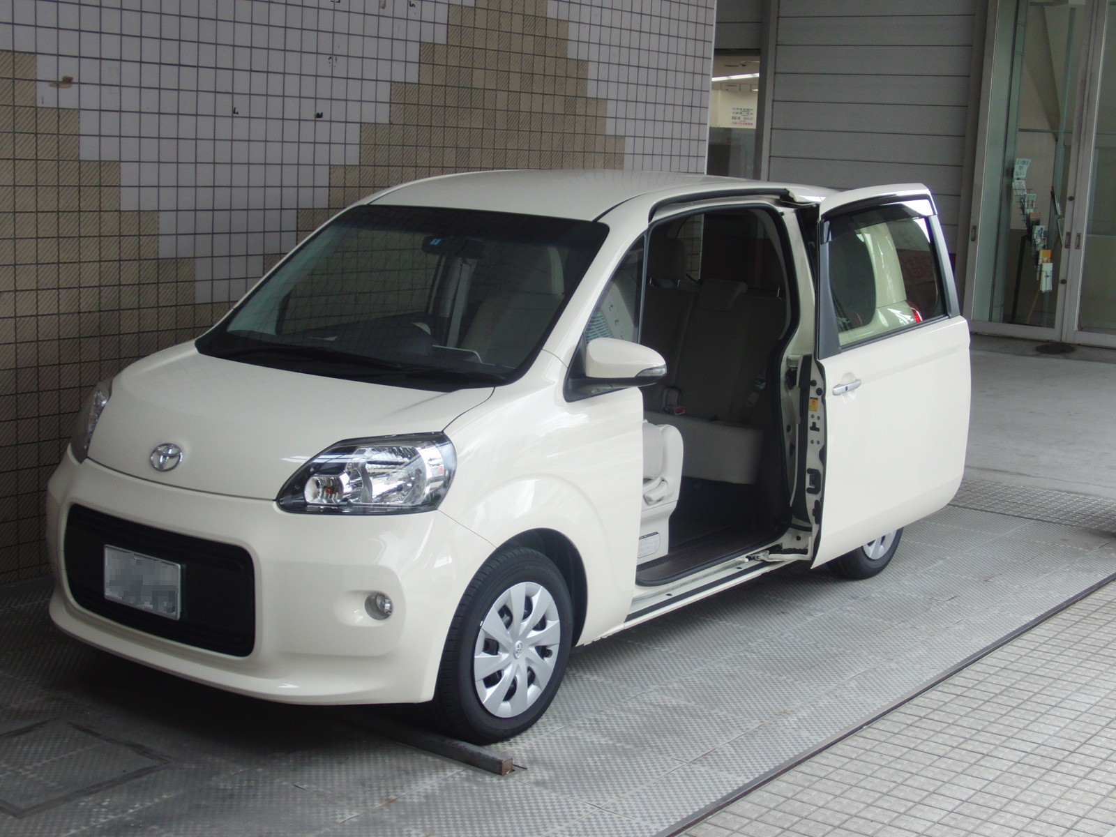 トヨタ・ポルテを撮影